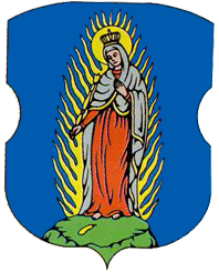 Herb miasteczka Poczajów z 1778